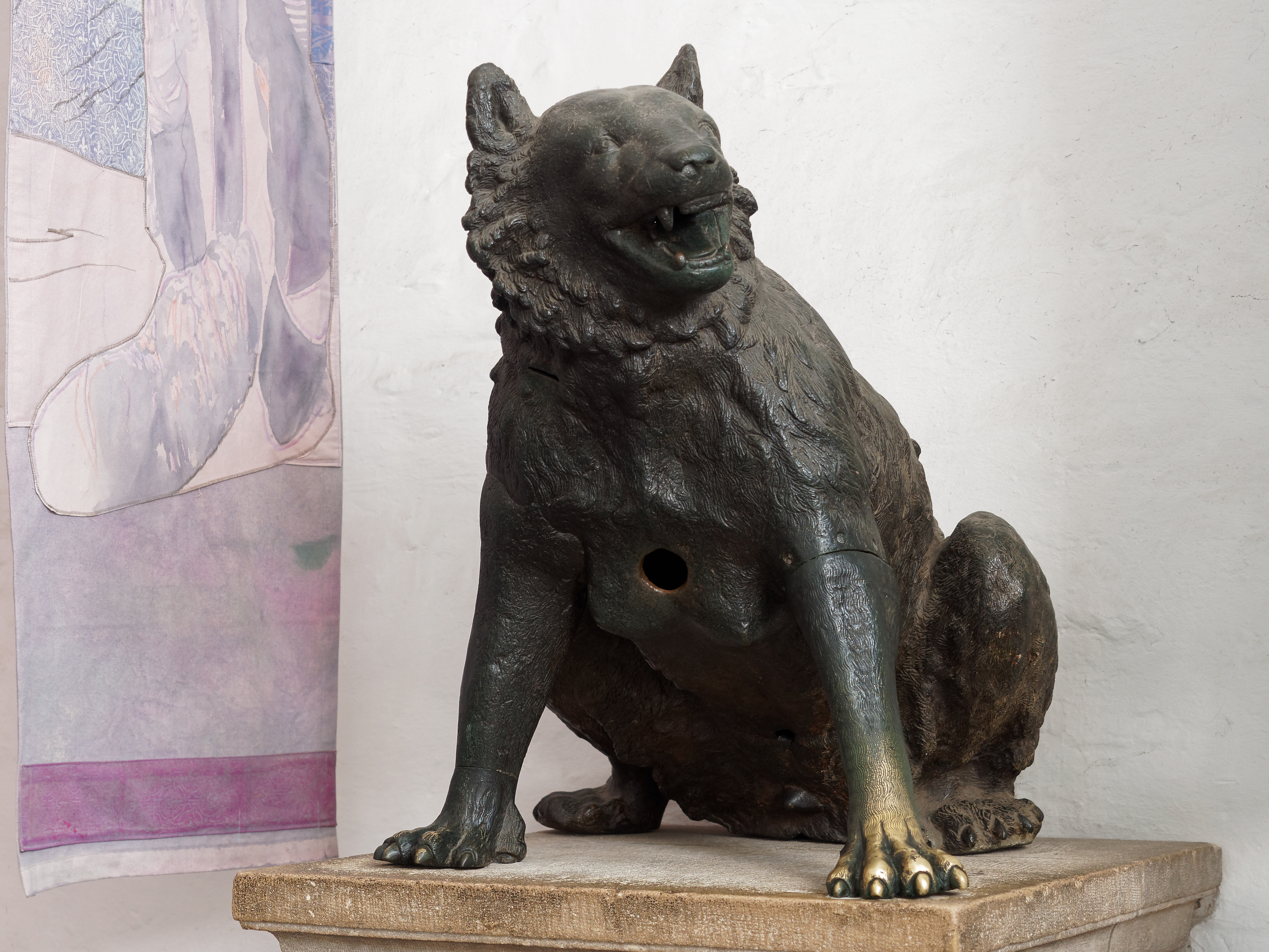 Bronzene Bärenskulptur in der Vorhalle im Turm im Dom in Aachen, Denkmal